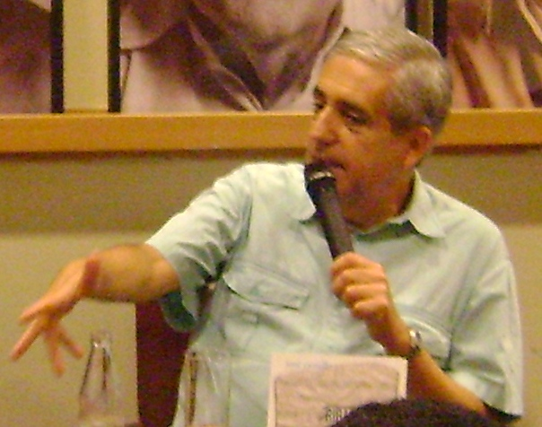 José Castello, escritor e crítico literário brasileiro, durante a Balada Literária, na Livraria da Vila, em São Paulo.